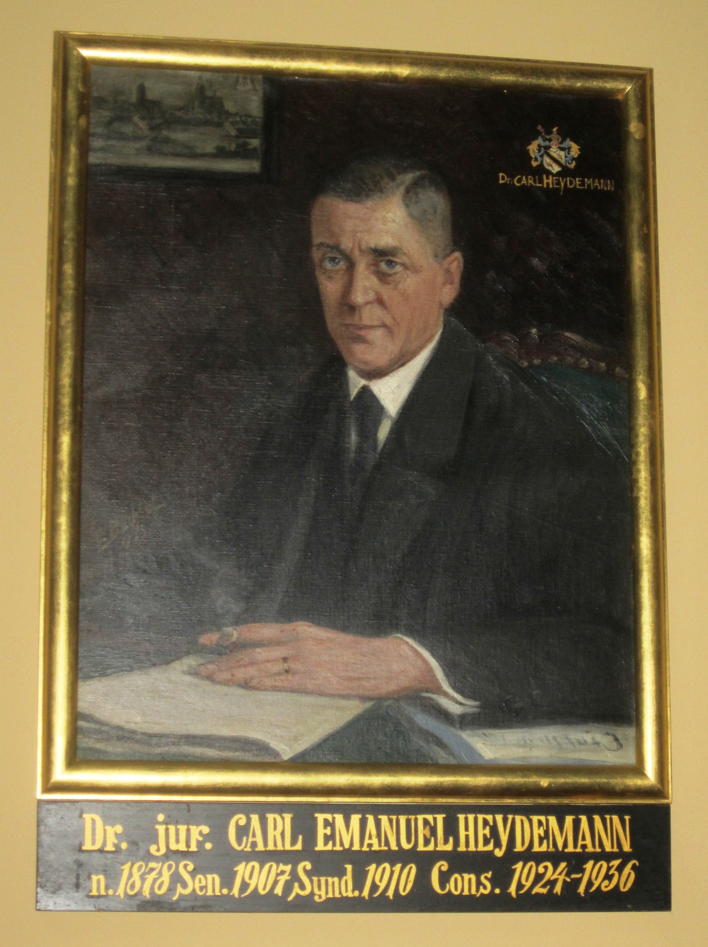 Carl Heydemann (1878–1939)